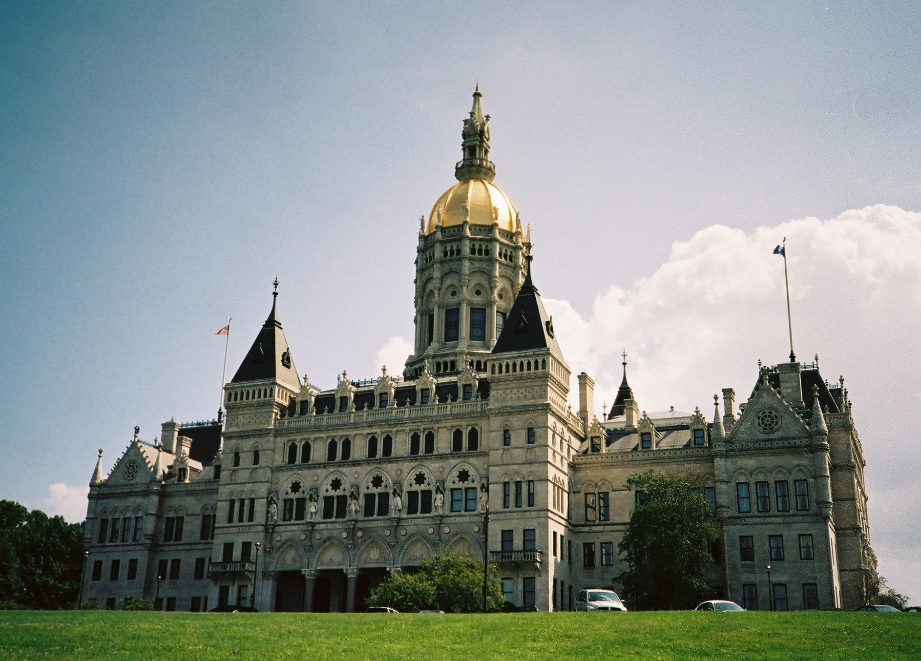 Auteur de la photographie : Georgio Sujet : Capitole de l'État du Connecticut Lieu: Hartford, États-Unis d'Amérique Date : juillet 2006